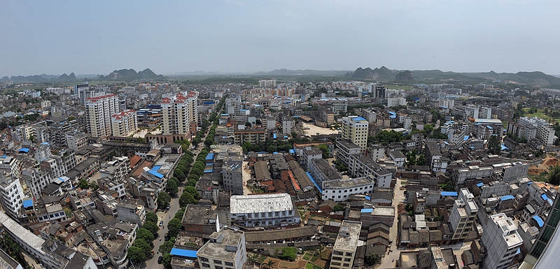 中文（中国大陆）: 崇左市扶绥县城新宁镇景象